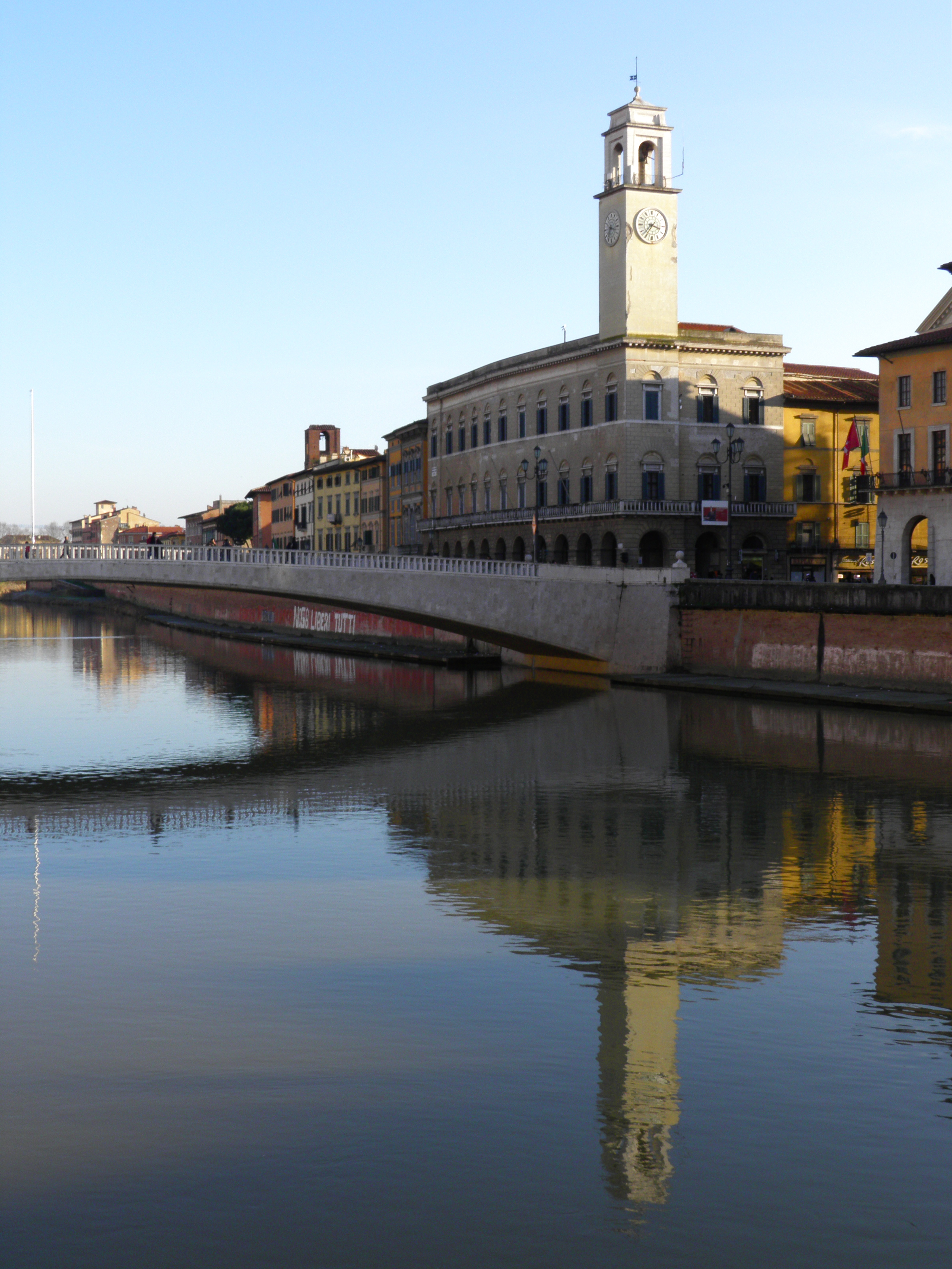 View of Palazzo Pretorio and Ponte di Mezzo, Pisa, Italy